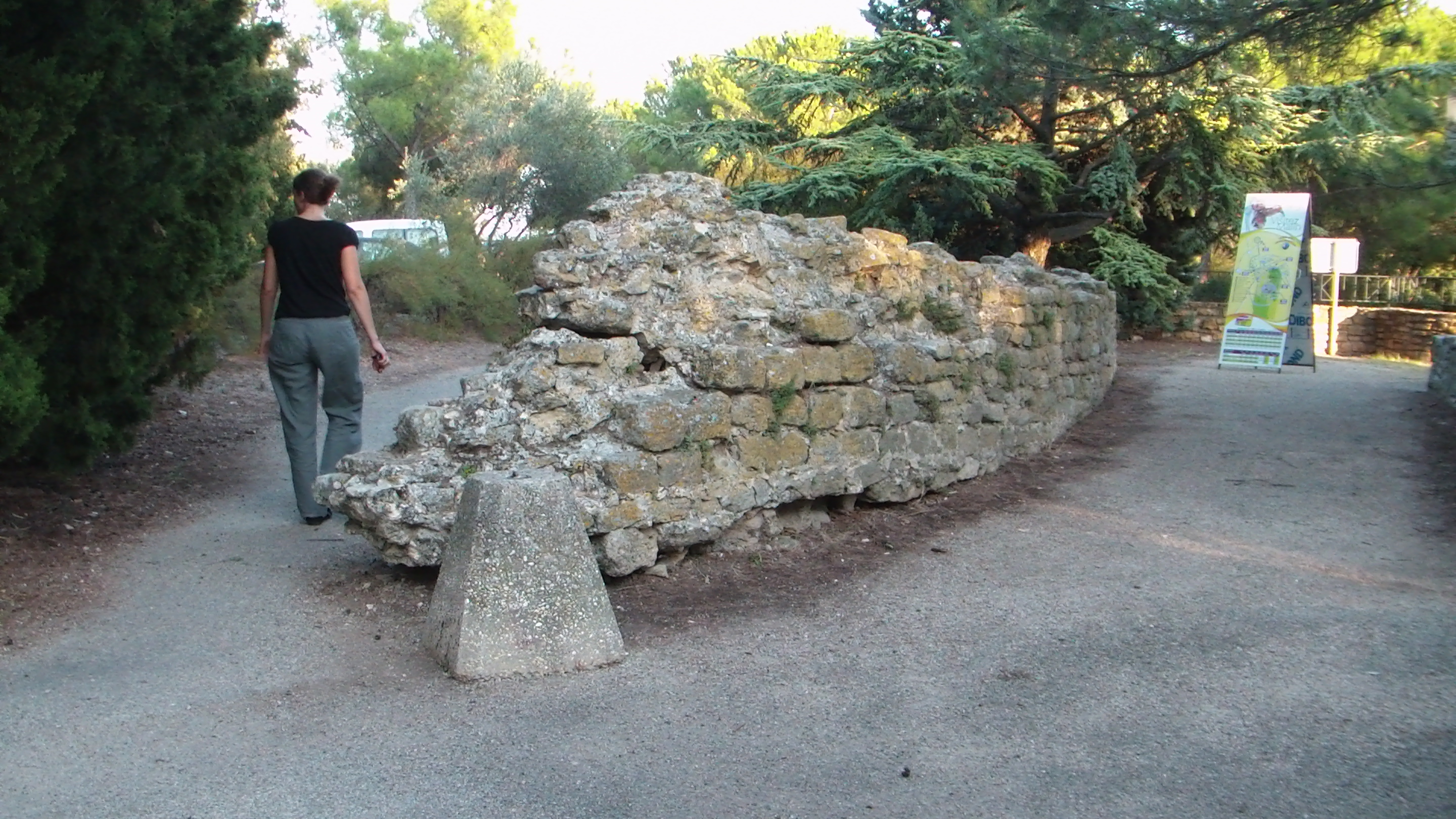 Vestige de l'ancien château de Maurice de Nassau sur la colline St Eutrope à Orange